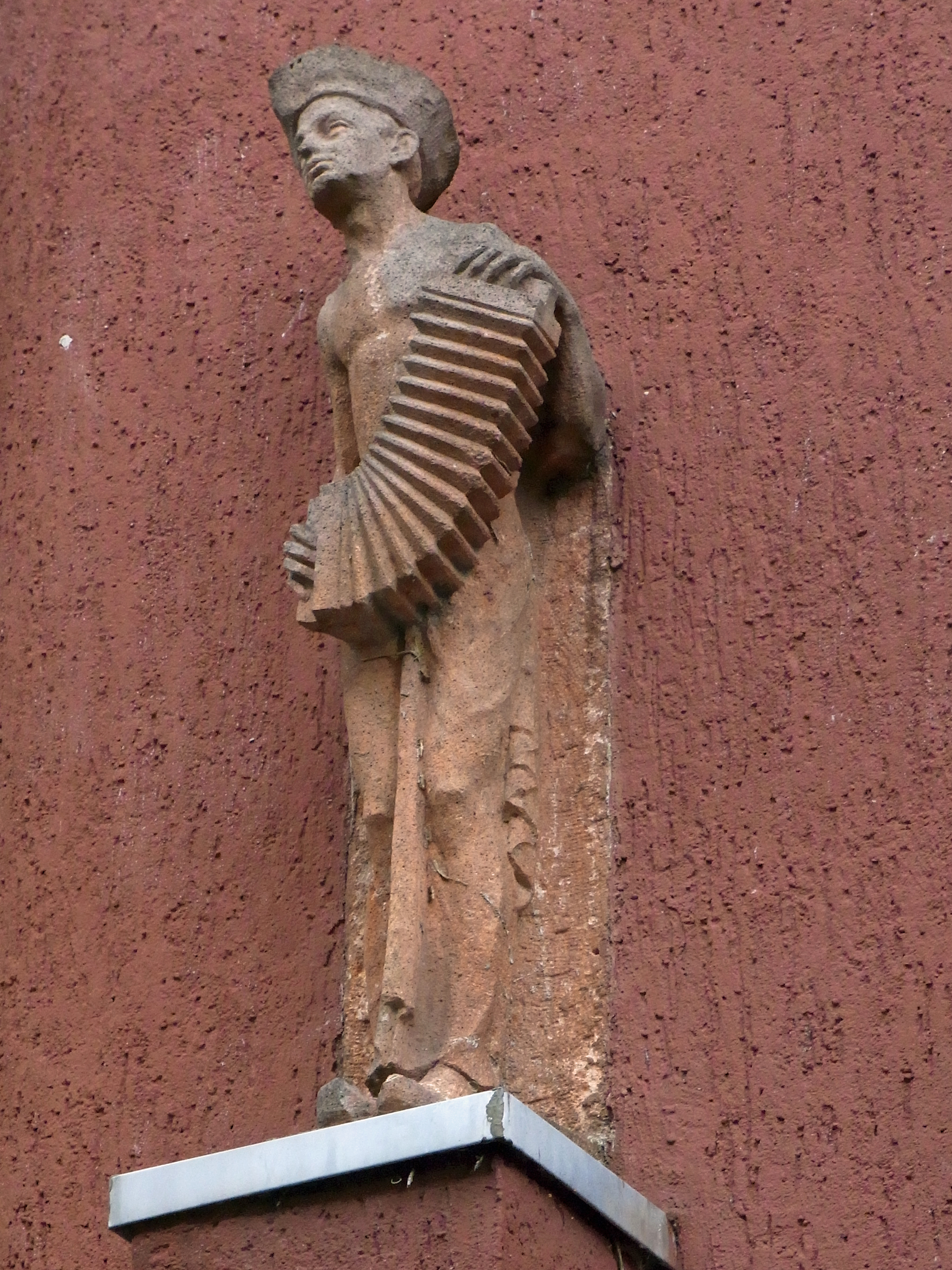 Tag des offenen Denkmals 2010: Hagen Cunosiedlung, Skulptur von Karel Niestrath